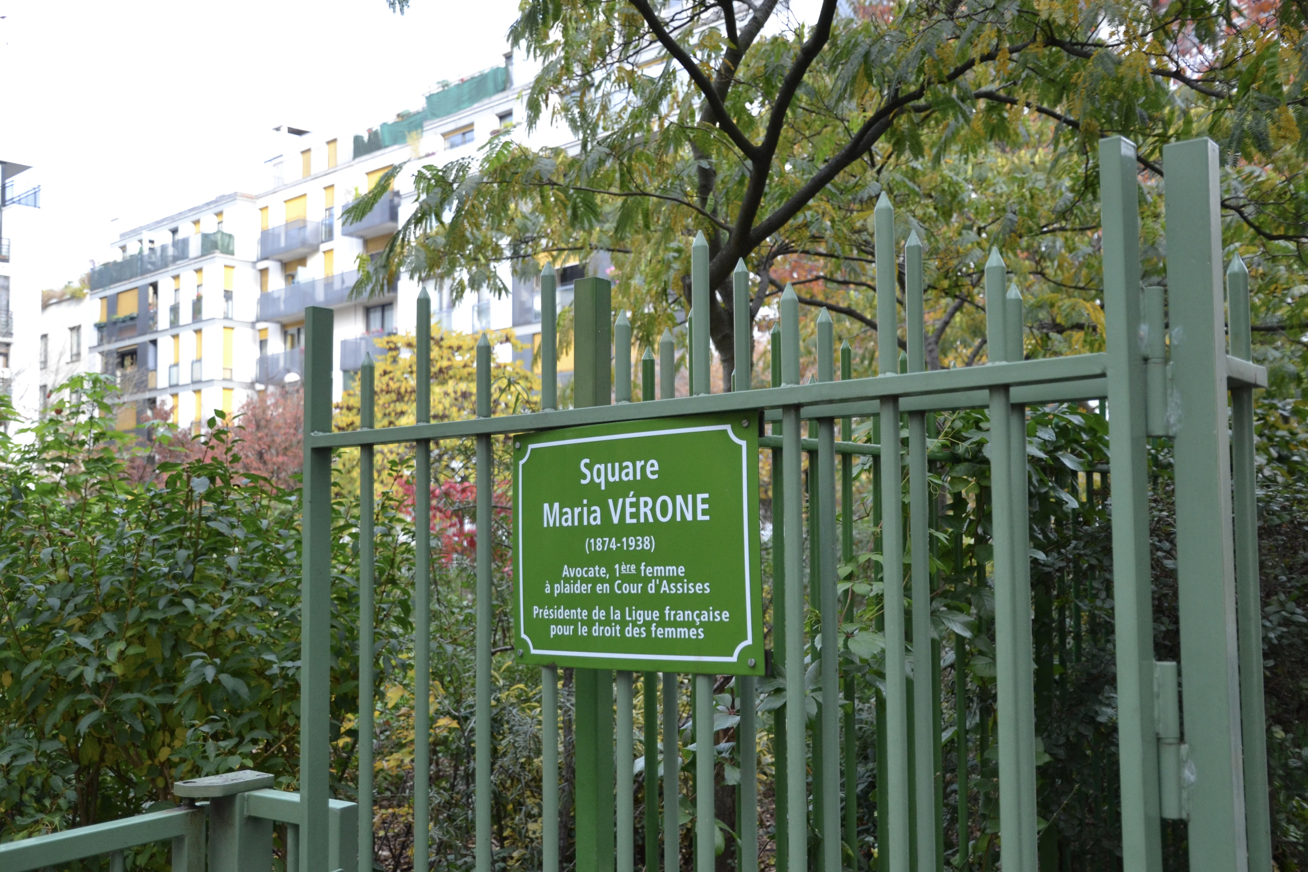 Maria Vérone, avocate, première femme à plaider en cours d'assise. Présidente de la ligue française pour le droit des femmes